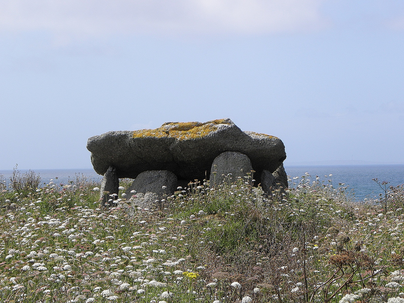 Dolmen de l'île Melon en Porspoder (29).